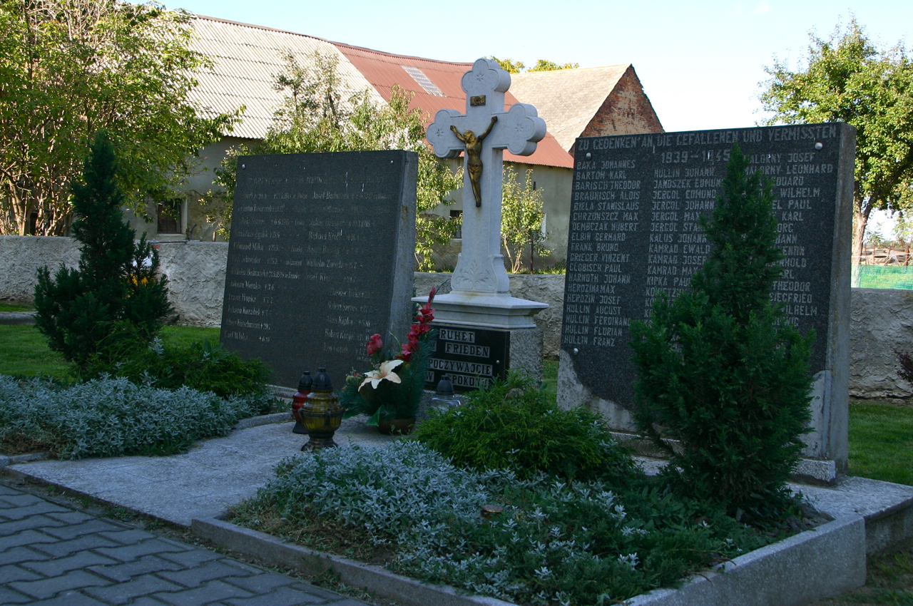 Stare Kotkowice (dodatkowa nazwa w j. niem. Alt Kuttendorf) – wieś w Polsce położona w województwie opolskim, w powiecie prudnickim, w gminie Głogówek.